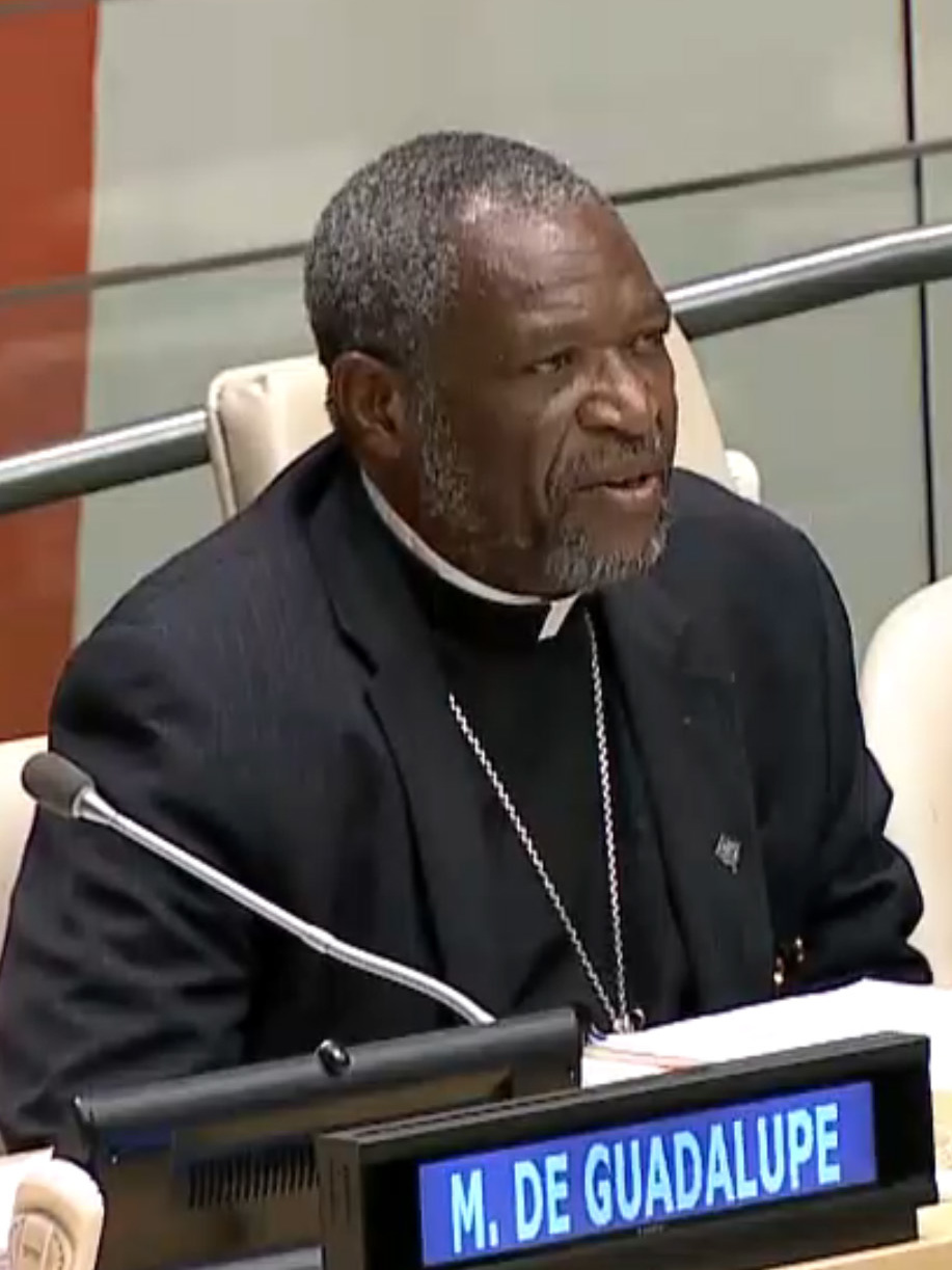 28.4.2016 #WeAreN2016 Los testigos de las atrocidades en masa y el éxodo de los cristianos y otras minorías religiosas.